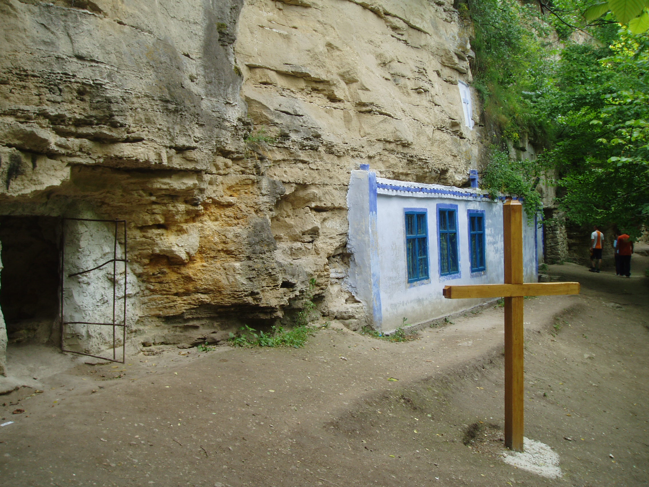 In Saharna, Moldova.